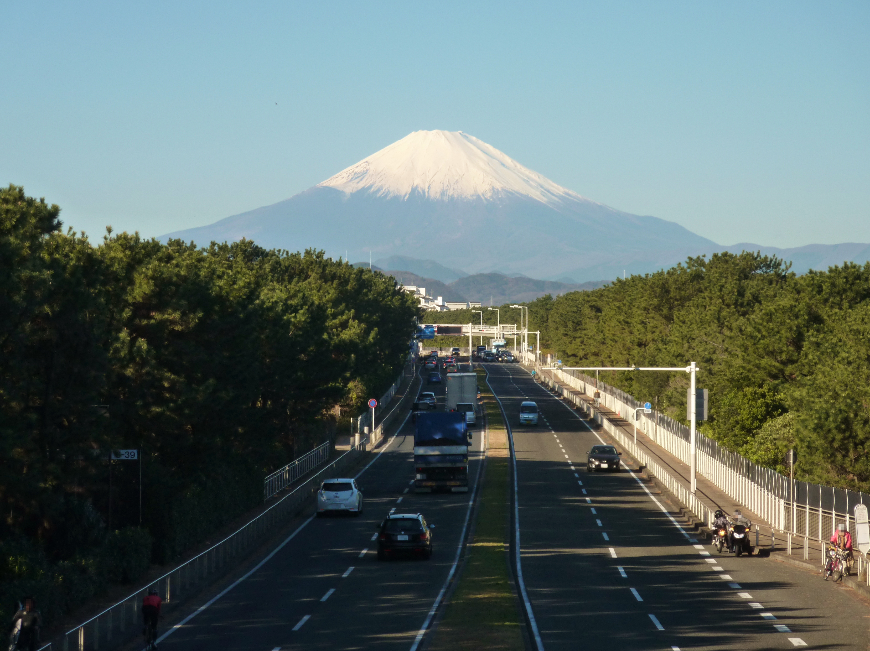 国道134号の第一中学校歩道橋から見た富士山（神奈川県茅ケ崎市）